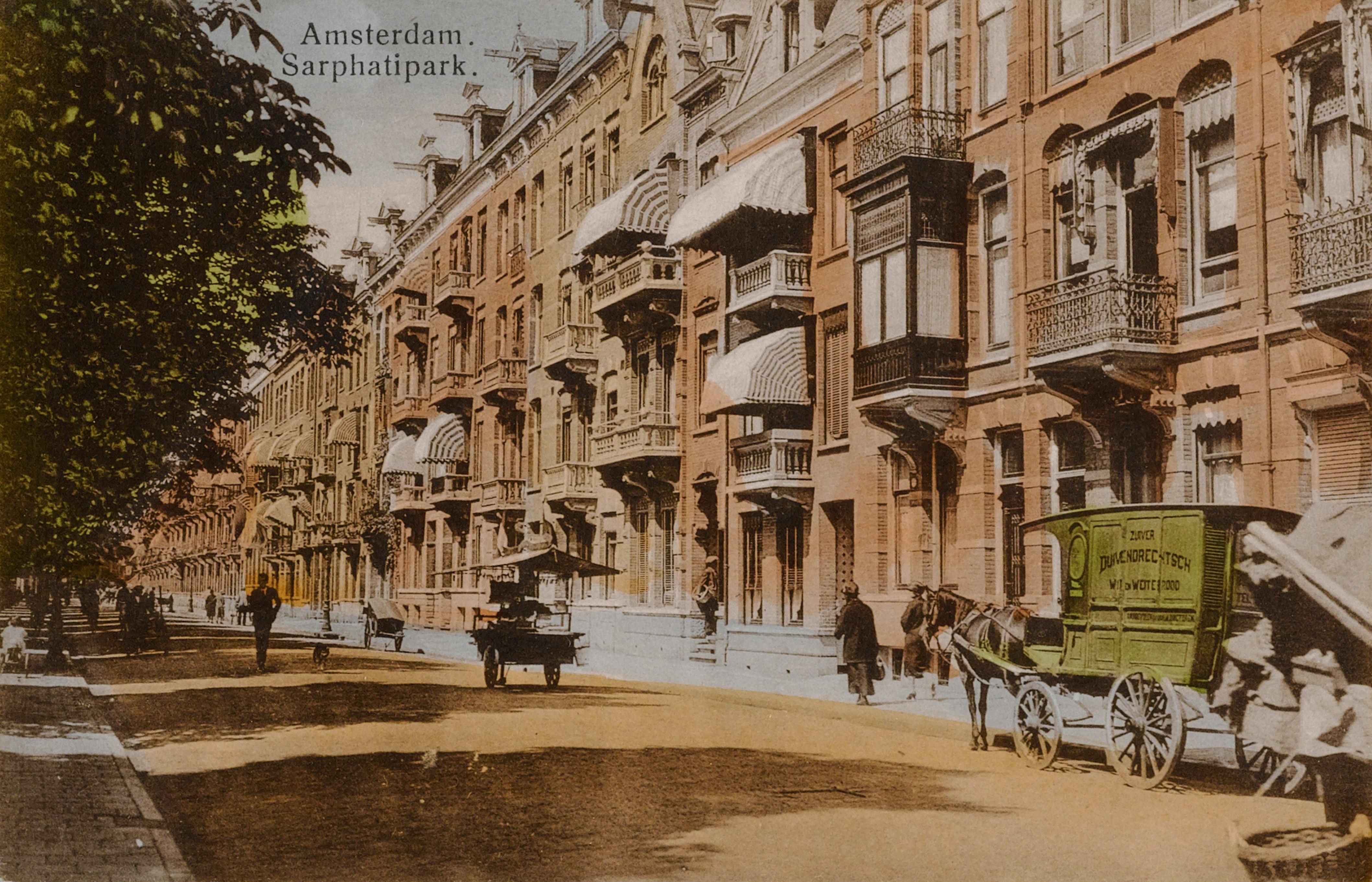 Beschrijving Sarphatipark gezien richting Eerste Jan Steenstraat Documenttype prentbriefkaart Vervaardiger Onbekend Anoniem Collectie Collectie Stadsarchief Amsterdam: prentbriefkaarten Datering 1927 Geografische naam Sarphatipark Inventarissen Afbeeldingsbestand PRKBB00244000004